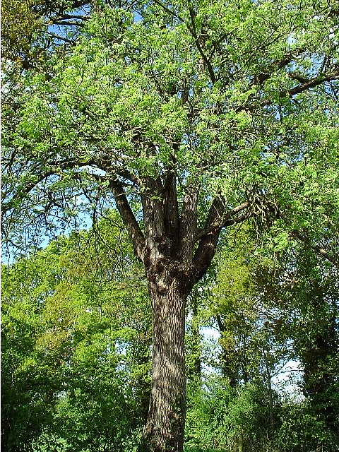 Cormier (Sorbus domestica), arbre remarquable car il a plus de 200 ans, situé à Pacé (35)